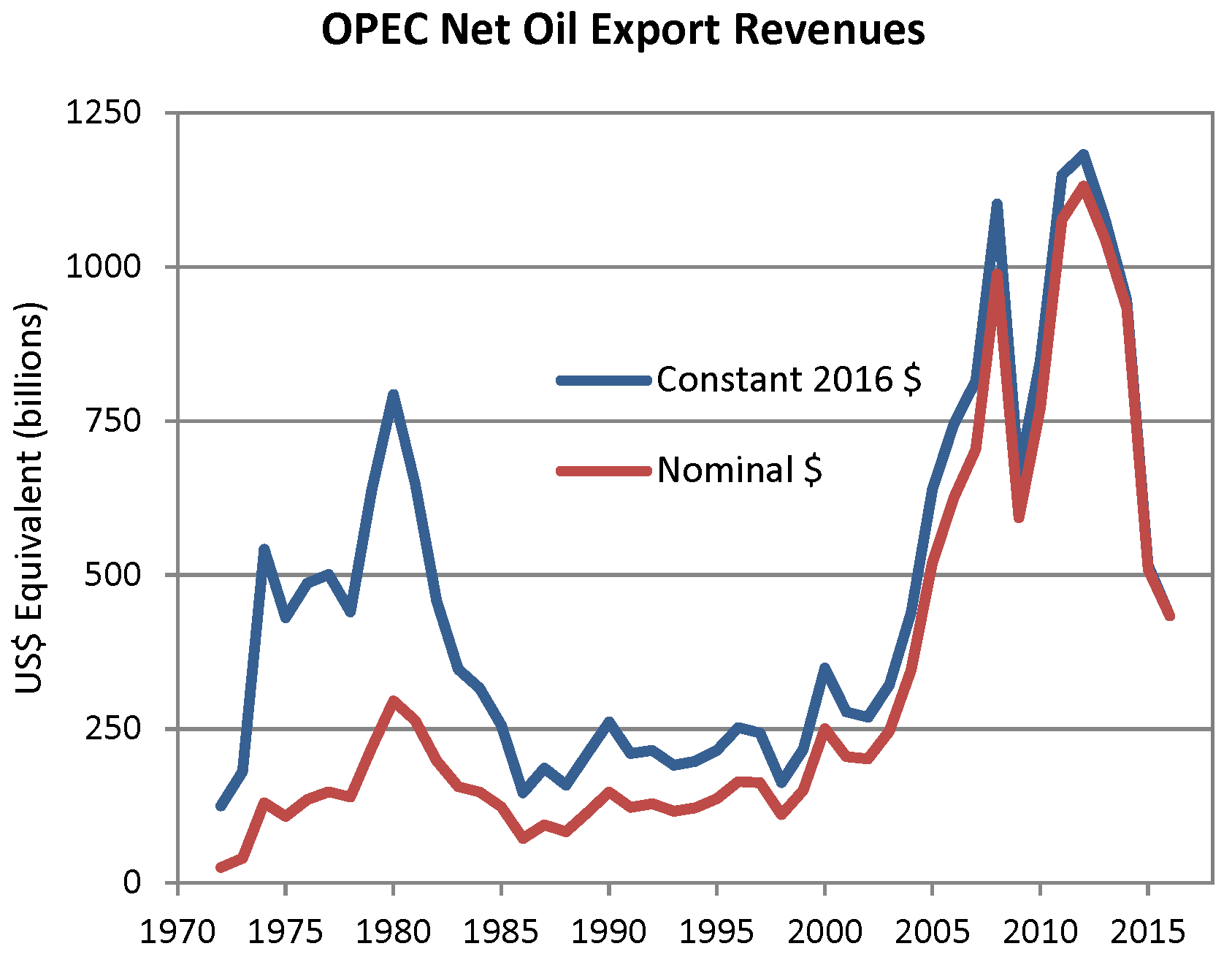 OPEC net oil export revenues (1972–2016)